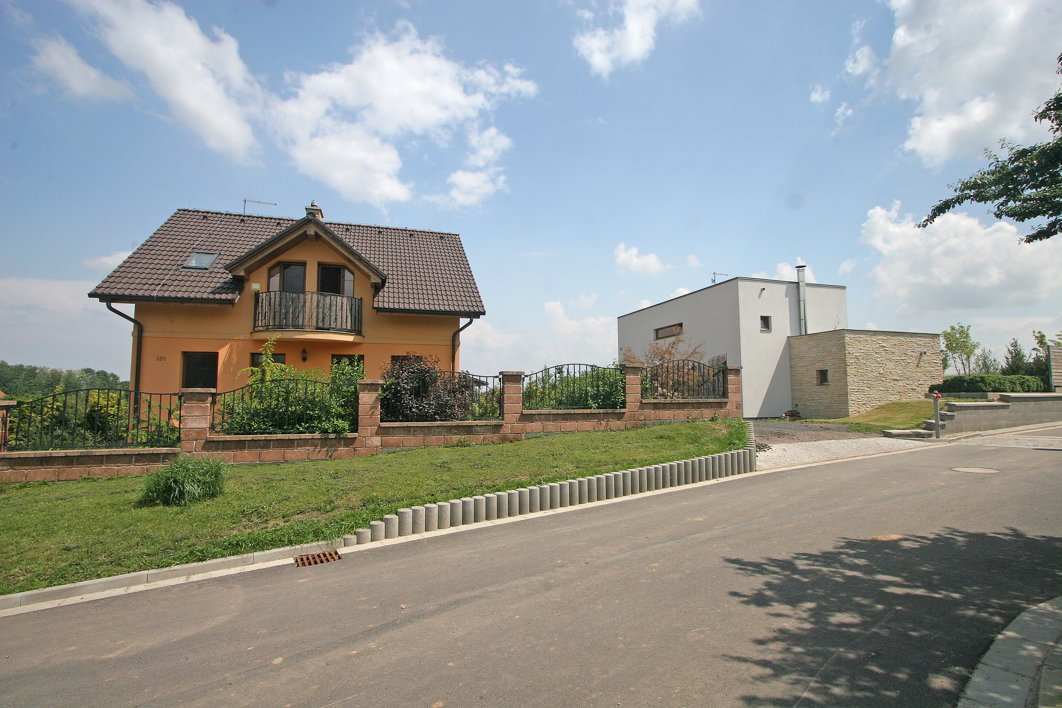 Stěžírky čp. 101